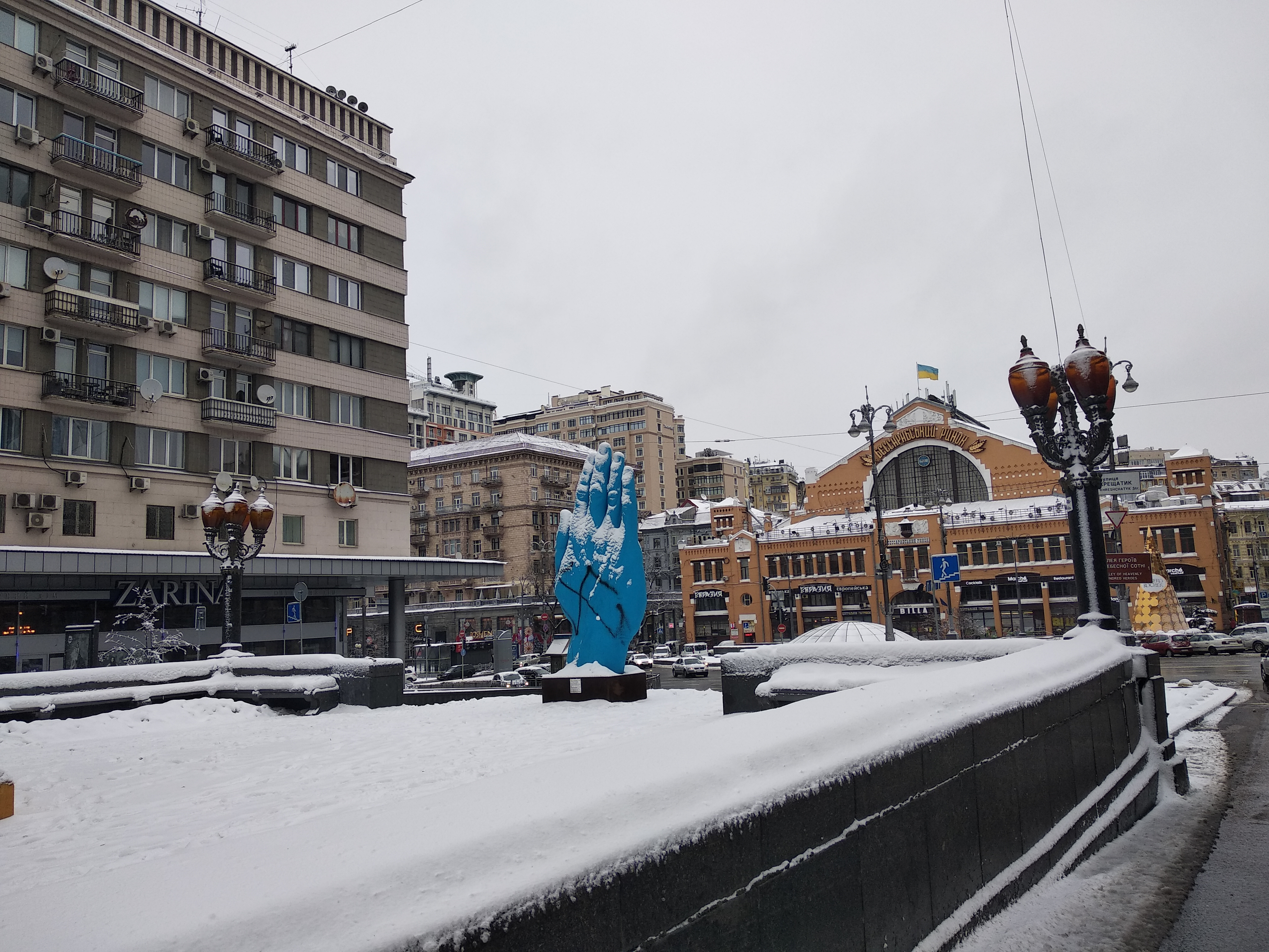 Ринок критий («Бесарабський»), Київ, пл. Бессарабська, 2